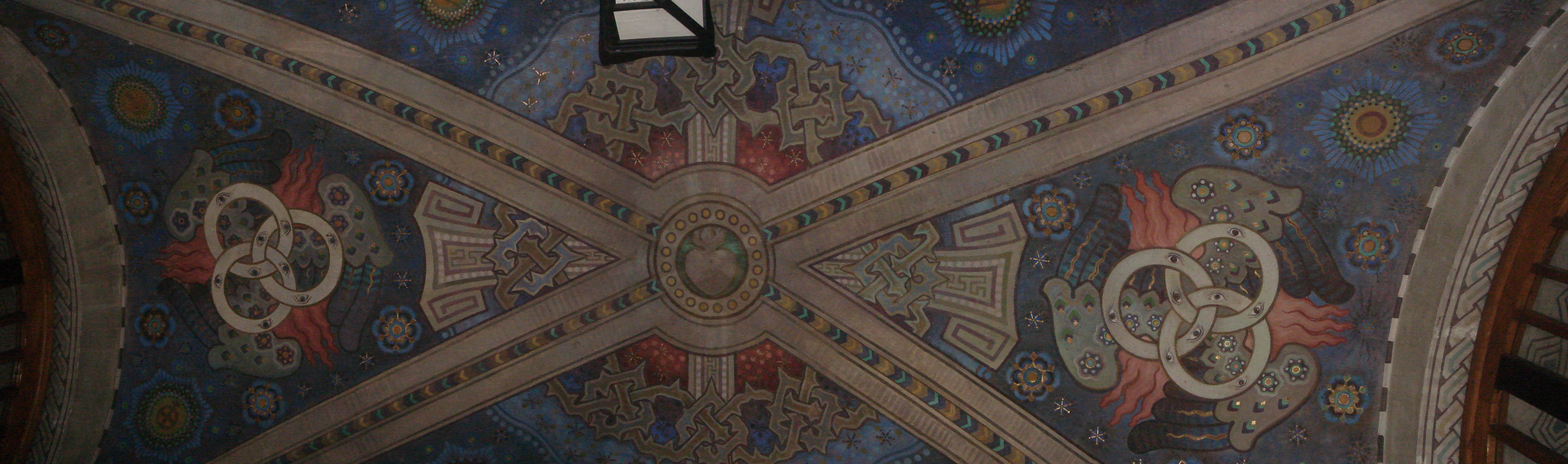 Nawa w Bazylice Zwiastowania Najświętszej Marii Panny w Czerwińsku nad Wisłą.